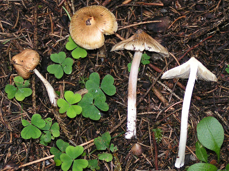 Inocybe rimosa - Cortinariaceae